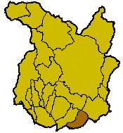 Localisation de la commune de Lamporecchio à l'intérieur de la province de Pistoia.